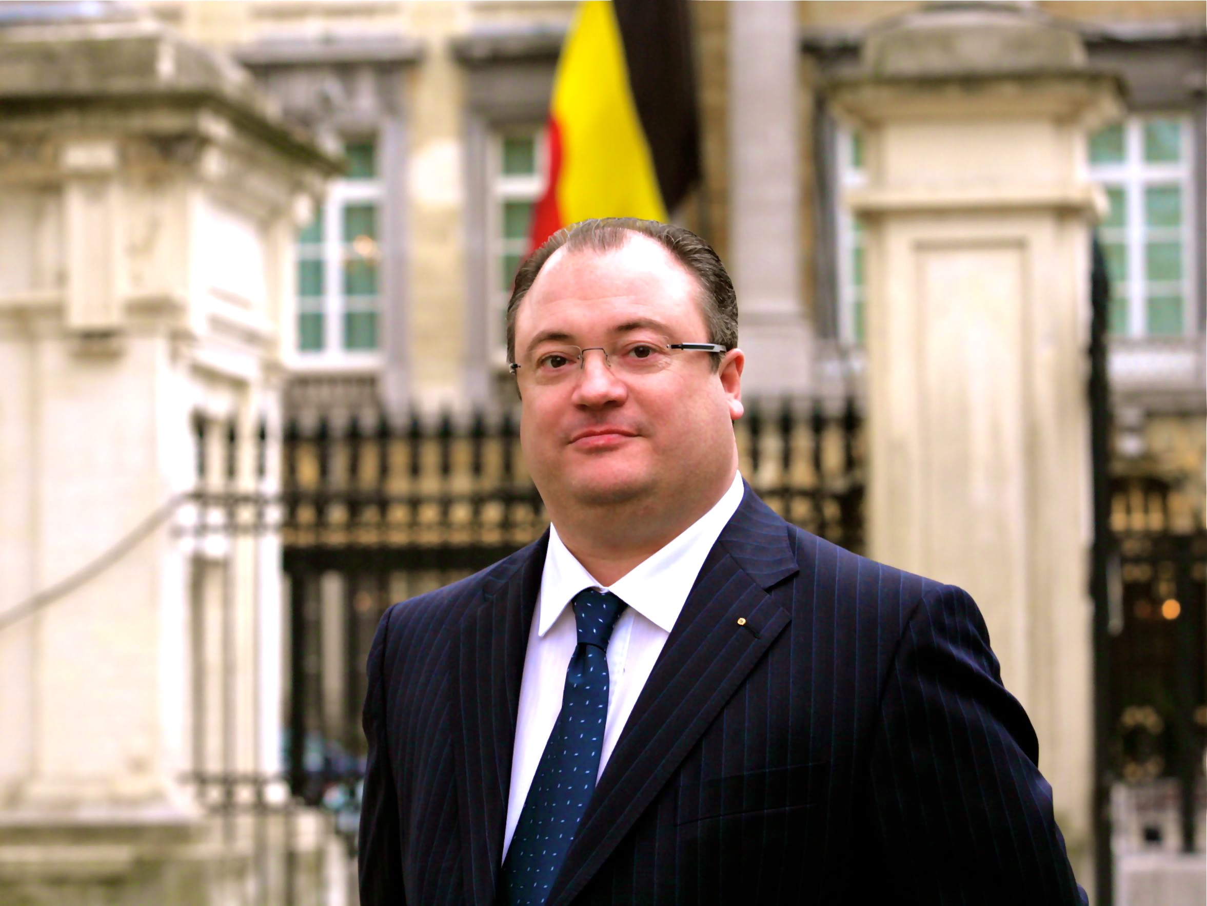 Olivier Destrebecq en 2012 devant le Parlement Fédéral